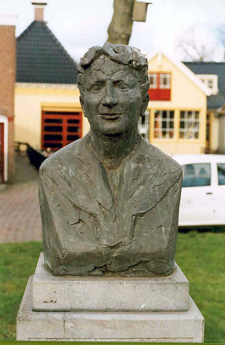 Frank Zeilstra, 1984